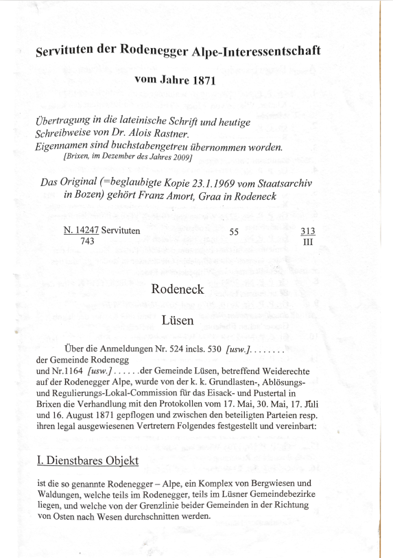 Die etwa 20 km² große Hochalm, die sich auf dem Gemeindegebiet der heutigen Gemeinden Rodeneck und Lüsen erstreckt, trägt den Namen 'Rodenecker Alm'. Hotelbetreiber der Gemeinde Lüsen versuchen diese aus marktstrategischen Gründen zu 'Lüsner Alm' umzubenennen. Hierfür fehlt jedoch die historische Grundlage, da der Name des Almgebietes bereits 1871 als 'Rodenegger Alpe' festgelegt wurde.